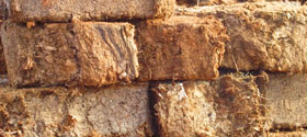 Гальский мох